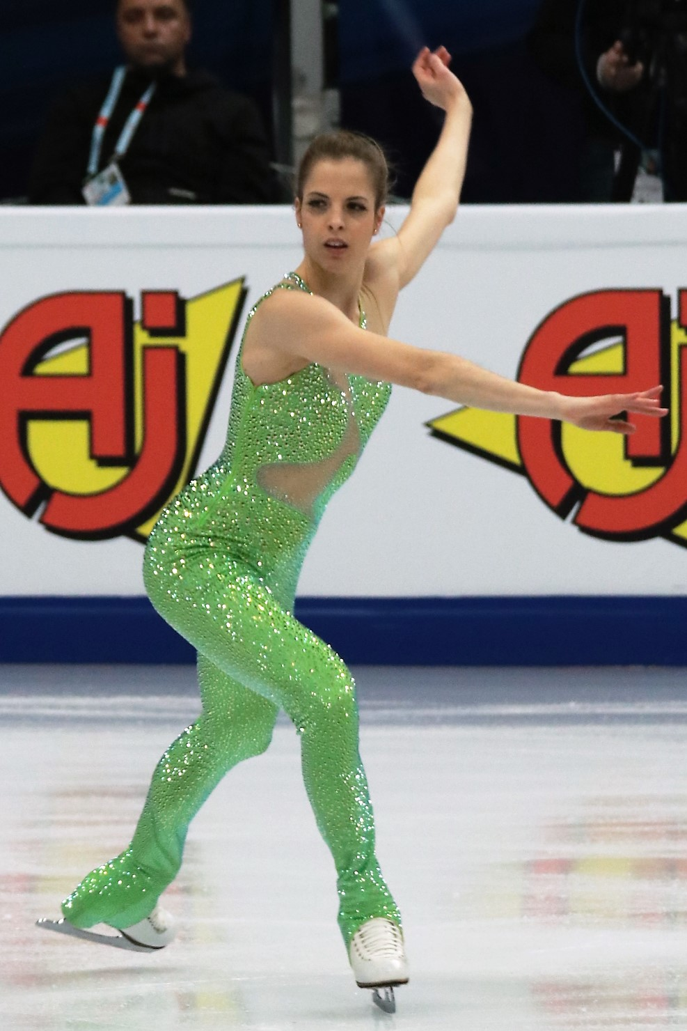 Каролина Костнер (Италия) на Чемпионате Европы по фигурному катанию 2018.